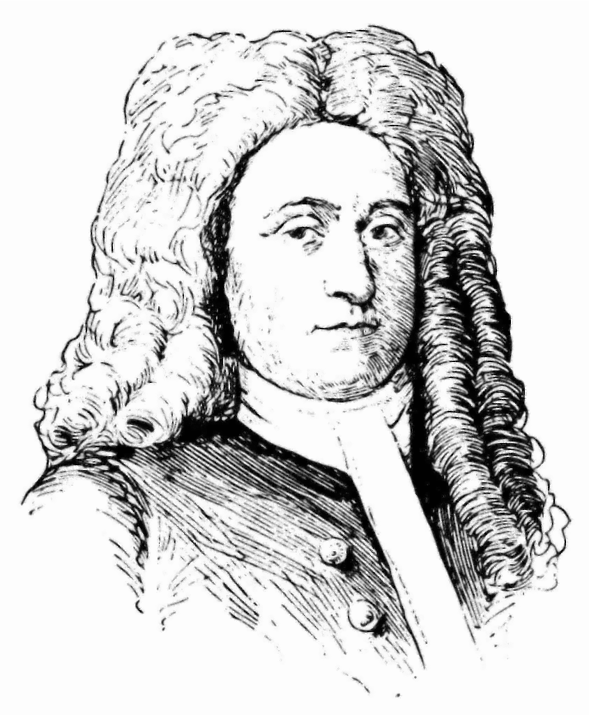 Questa immagine è stata ricavata, schiarita e ritagliata tramite GIMP da un'illustrazione del quinto volume della Appletons' Cyclopædia of American Biography, edita fra il 1887 ed il 1889 dalla D. Appleton & Company.